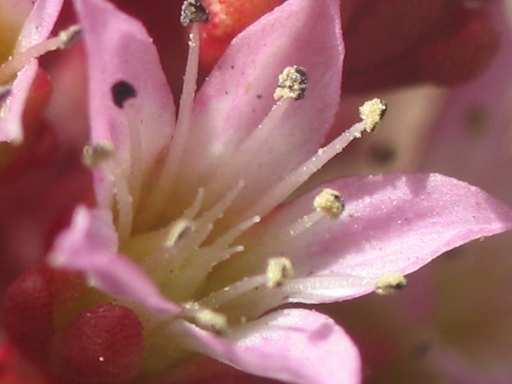 Pablo Alberto Salguero Quiles. Gredos. Ávila. España.